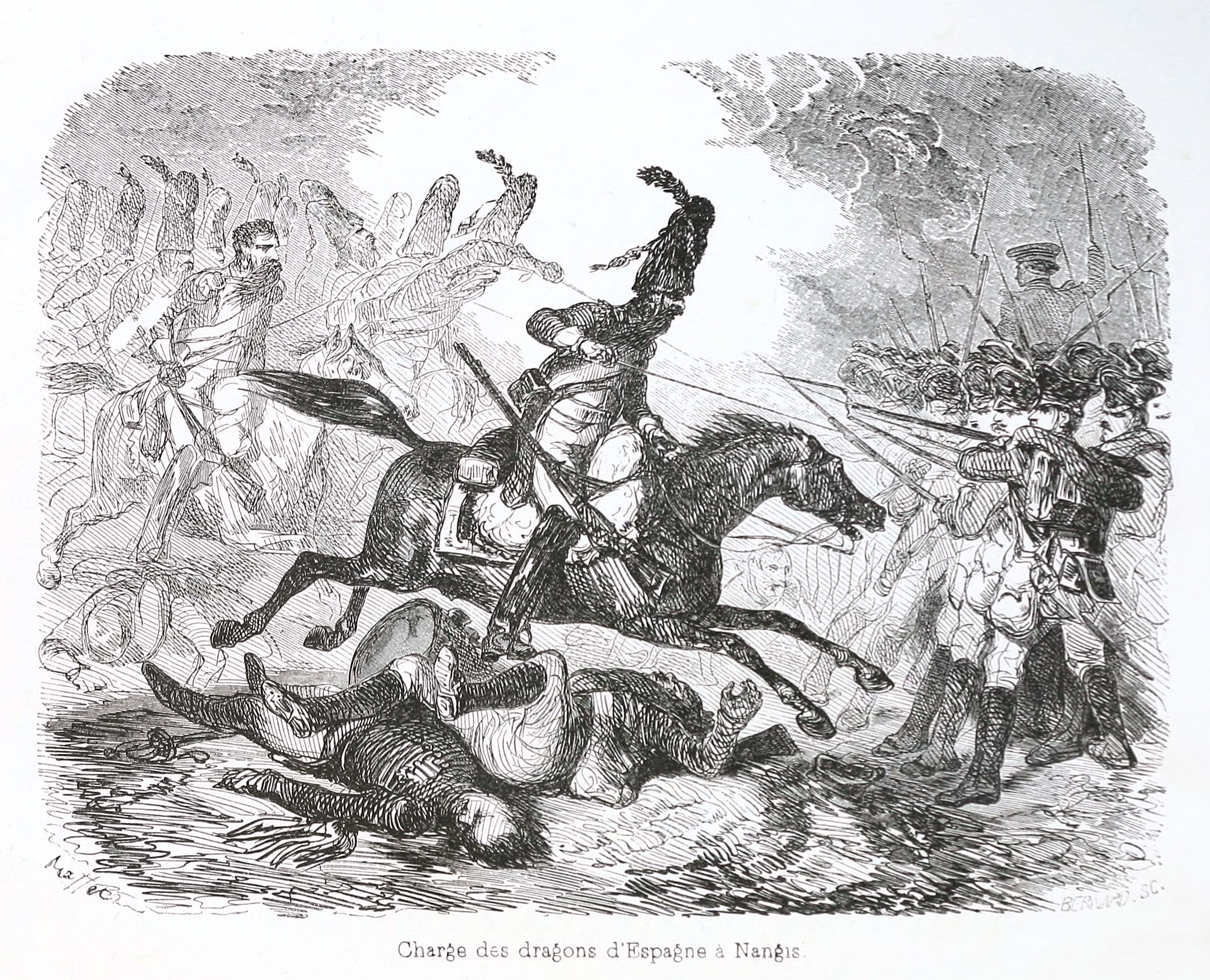 Raffet,Charge des dragons d'Espagne ers 1840